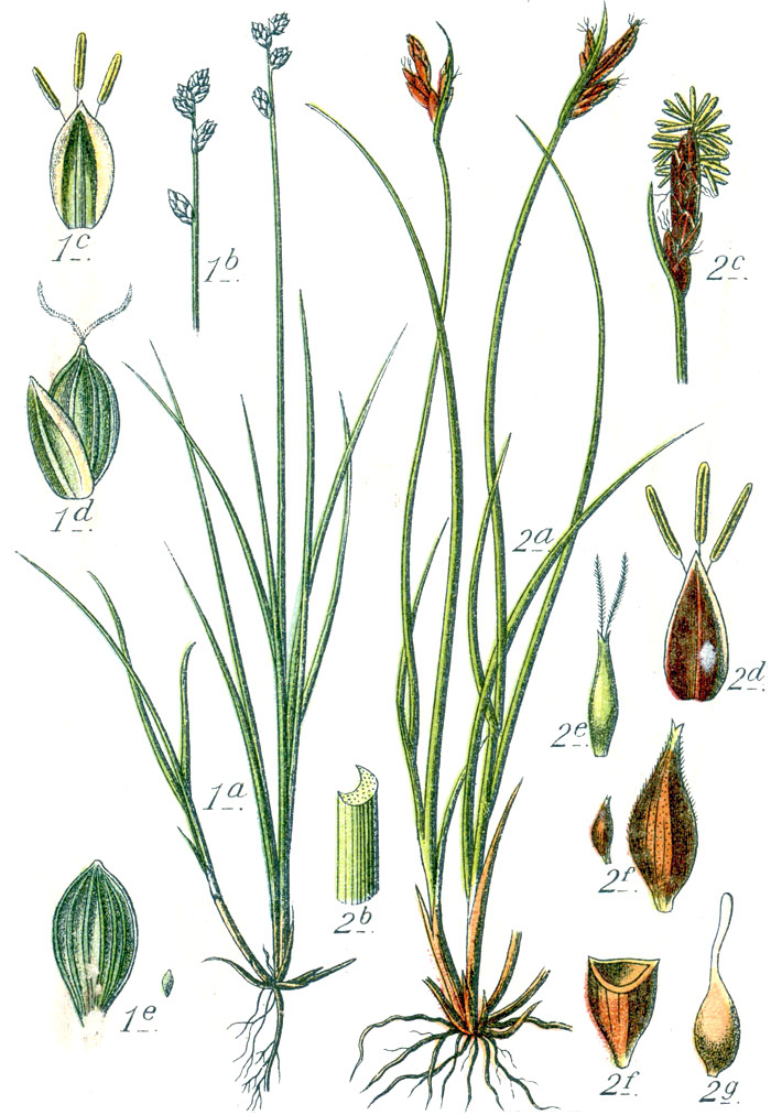 1. Carex loliacea L. 2. Carex mucronata All. Original Caption 1. Lolch-Segge, Carex loliacea 2. Spitz-Segge, C. mucronata